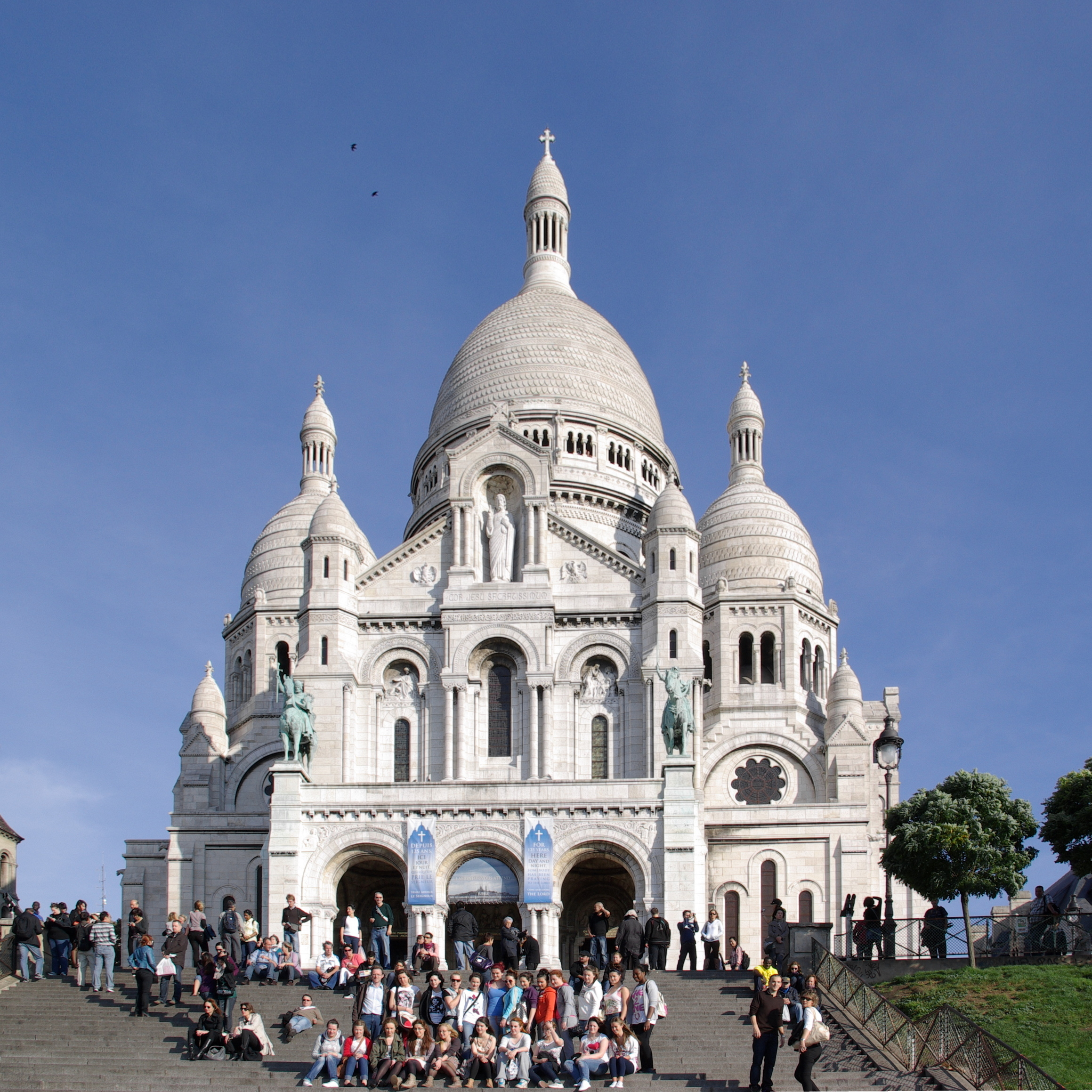 Paris, Sacré-Cœur de Montmartre